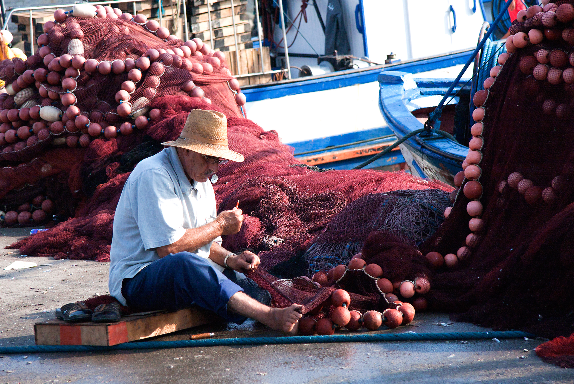 Un vieil homme au port de Tipasa au bon matin , reparant les filets de pêches pour les preparer à une nouvelle sortie en haute mer ,, ce vieux en travaillant faisait participer touts ses organes au travail , Les yeux , la tête, les mains, et les pieds aussi ... un travail tres munitieux qu'il pratiquait avec grande passion un matin d'hiver ... This is an image of "African people at work" from Algeria